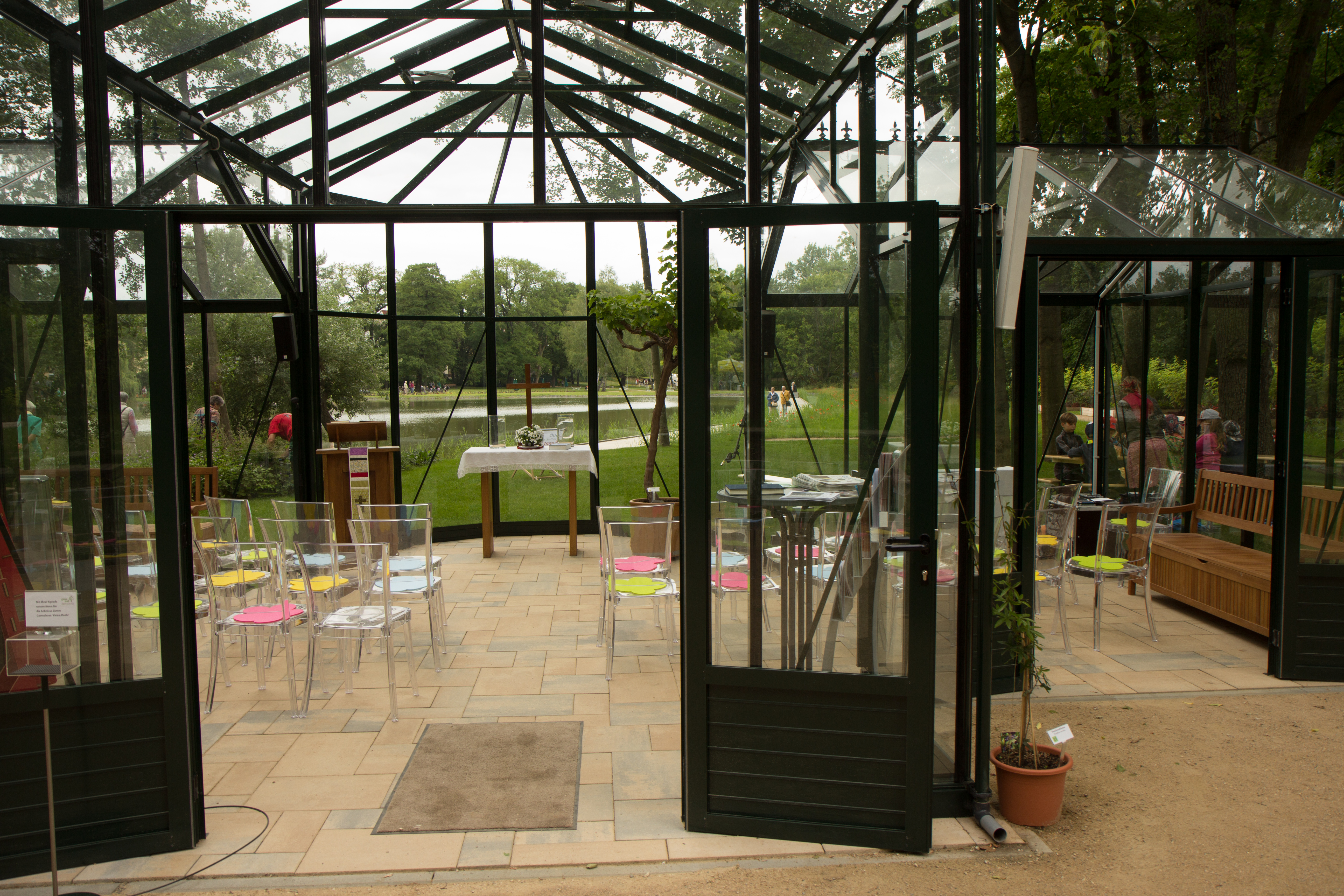 4. Thüringer Landesgartenschau 2017 in Apolda